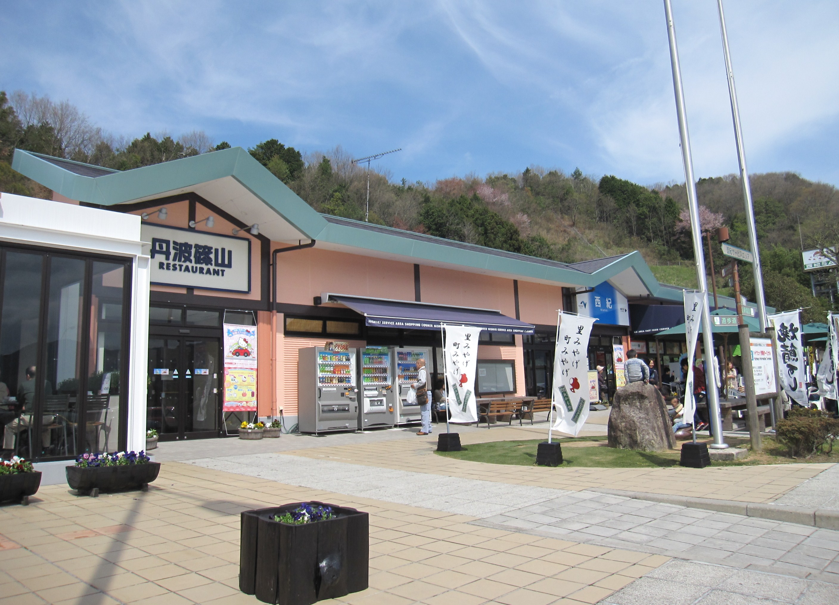 西紀サービスエリア下り線側施設